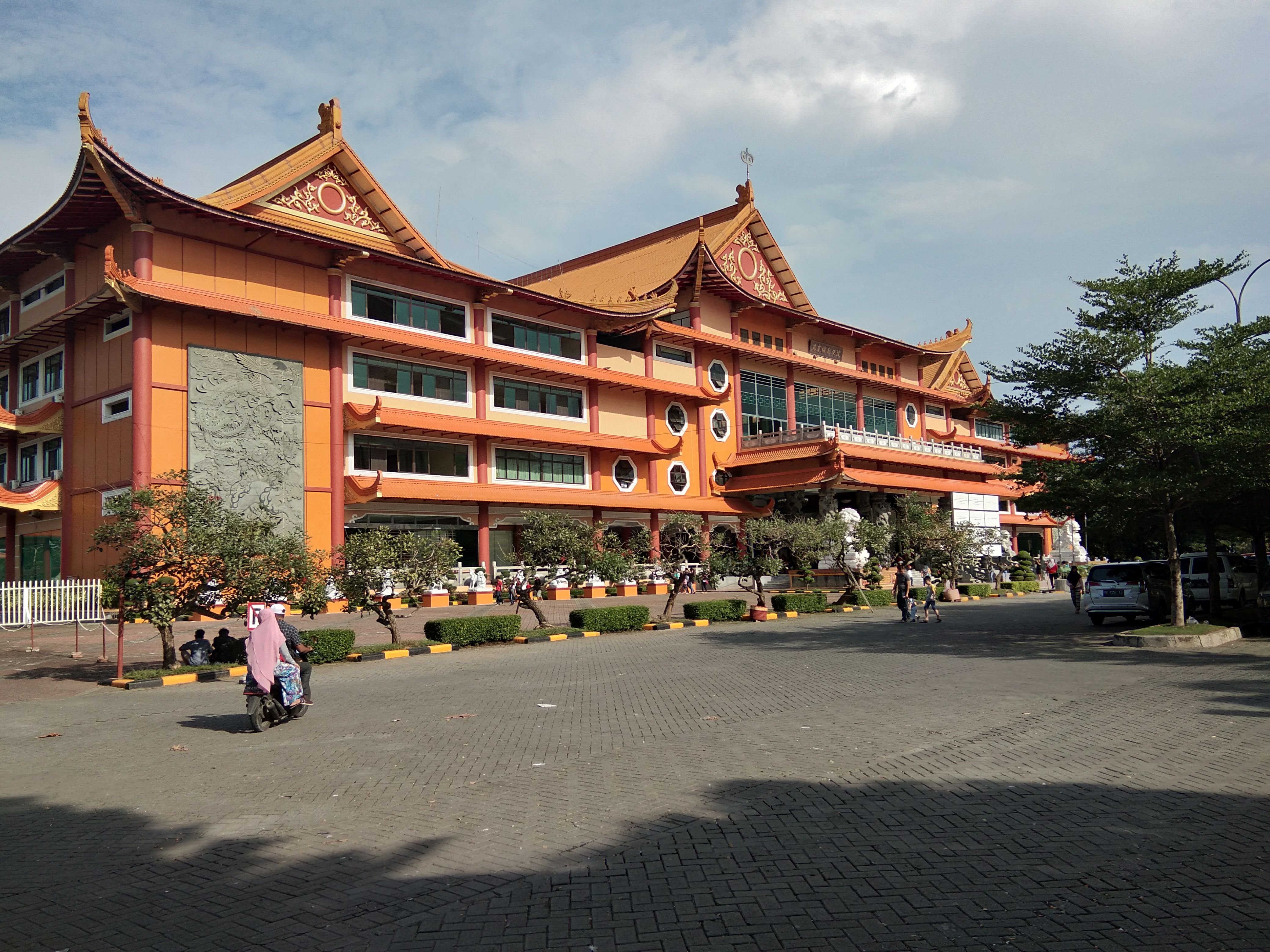 Foto diambil dari sebelah kiri